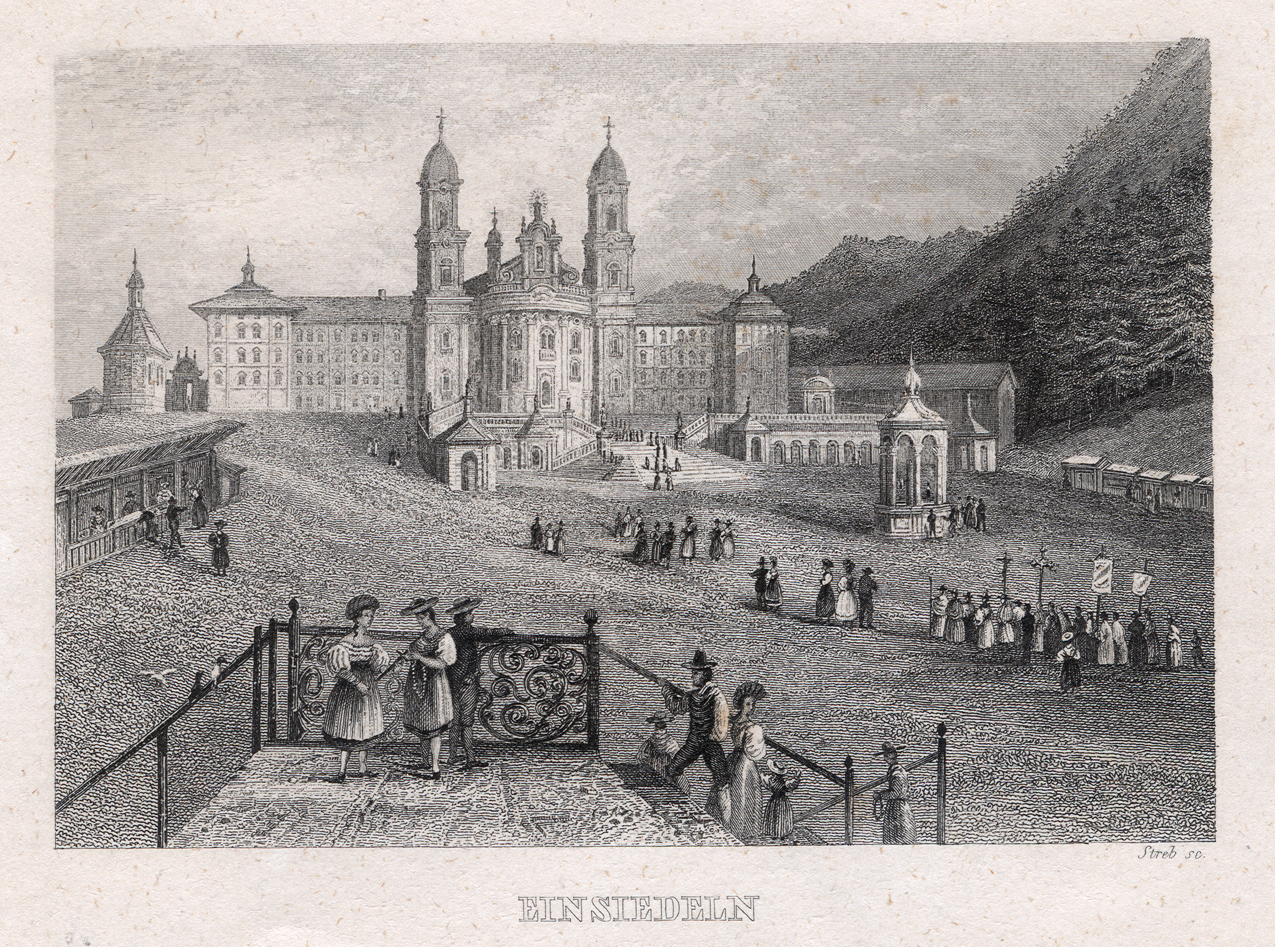 Stahlstich von Streb, dessen Vorname bisher noch ungeklärt ist, vom Kloster Einsiedeln. Auf dem dem Kloster vorgelagerten Gelände ist eine Prozession zu sehen, auf der linken Bildseite erklimmen Menschen in Tracht eine Aussichtsplattform/Tribüne (?). Ausschnitt. Maße des gesamten Blattes, das offensichtlich mit der Hand geschnitten wurde, circa 16, 1 cm x 11,6 cm